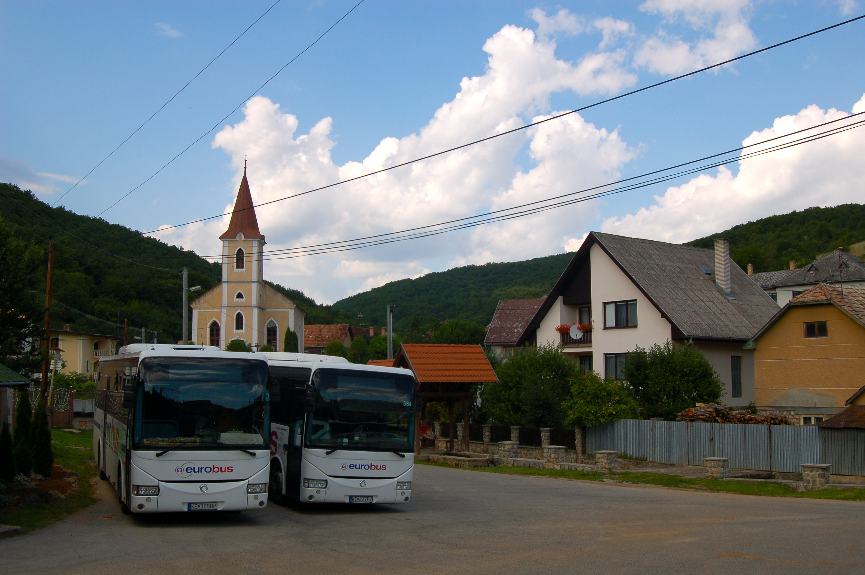 Village de Kečovo